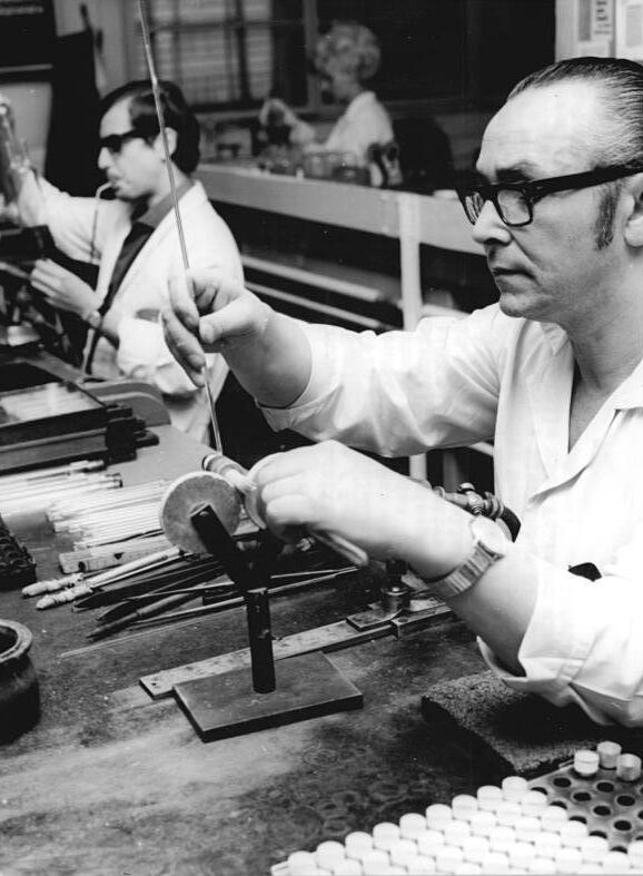 Zentralbild Brüggmann 6.8.70 Berlin: Sozialistisches Kollektiv Lebensfreude fertigt Senderöhren - Kampf um 2. Staatstitel Im Bereich Senderöhren Des VEB Fernsehelektronik wirkt das sozialistische Arbeitskollektiv "Lebensfreude". Bei der Durchsetzung des Systems der fehlerfreien Arbeit konnte das Kollektiv im 1. Halbjahr 1970 95 218,75 Mark an Materialkosten einsparen. Im Haushalts- und Brigadetagebuch spiegelt sich viel Initiave dieser Werktätigen wieder. Glasbläser Ulrich Hübner beim Vorbereiten eines Glaskolbens. Alle Kollegen sind Spezialkräfte und arbeiten schon jahrelang zusammen. (Beachte auch J0806-6-1N)